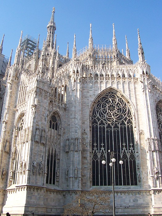 Milano - Abside del Duomo